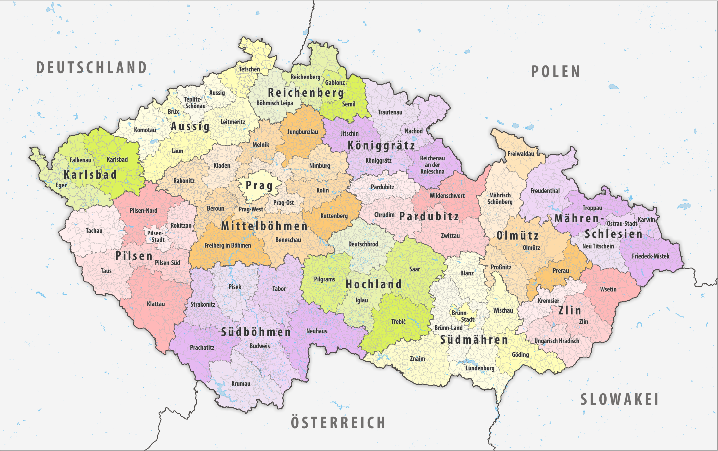 Regionen, Bezirke und Gemeinden Tschechiens